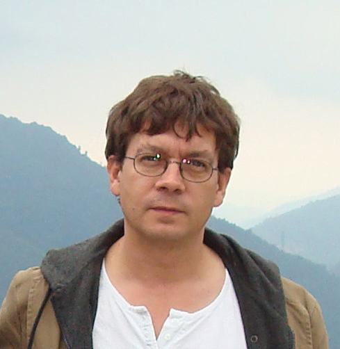 Foto del escritor Juan Carlos Chandro